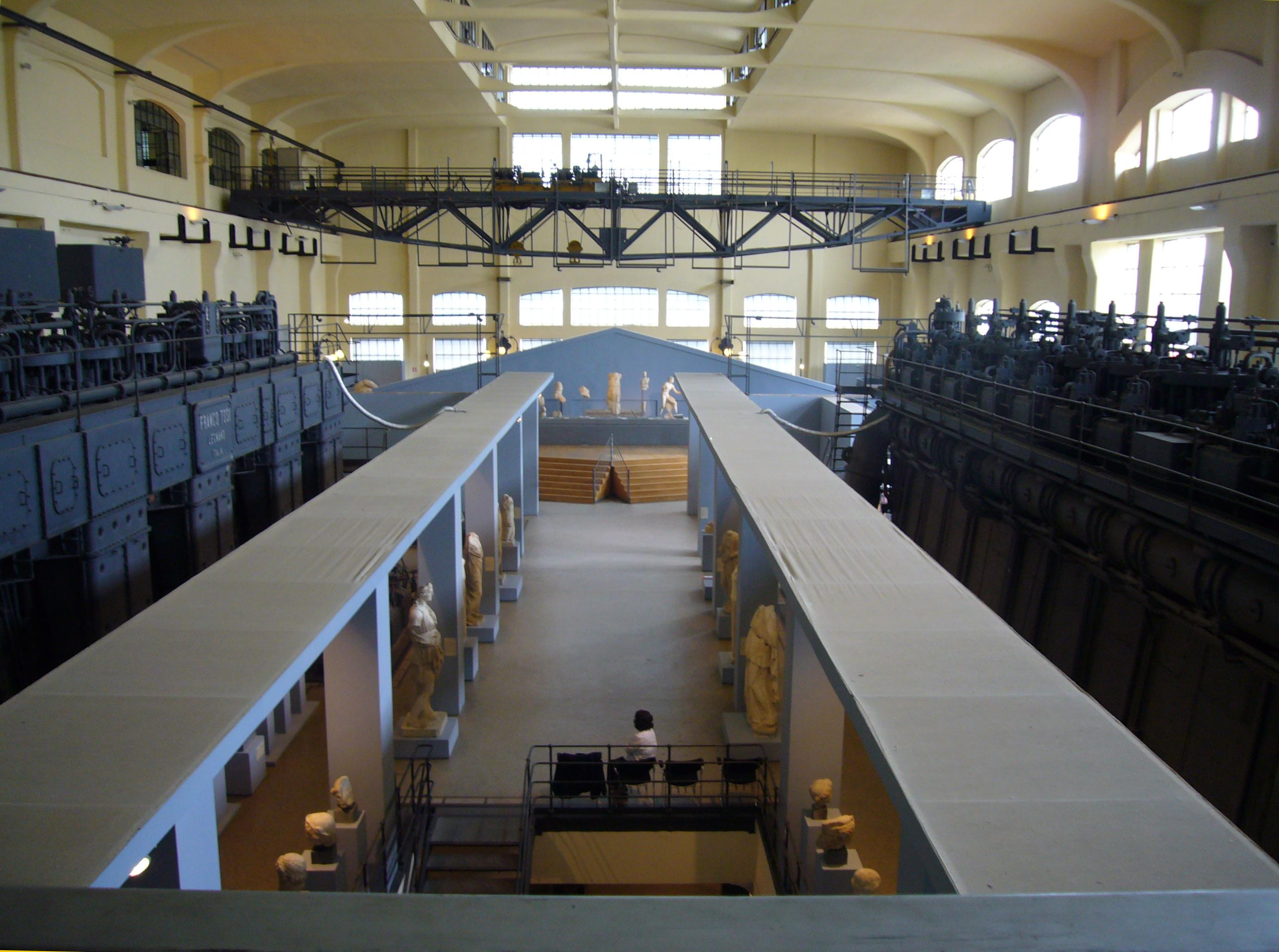 Centrale Montemartini a Roma: sala macchine. Centrale Montemartini Native nameCentrale MontemartiniLocationRome, ItalyCoordinates41° 52′ 00.48″ N, 12° 28′ 41.12″ E Established2005Web page control : Q1054090 VIAF: 268486794 GND: 10105941-3 institution QS:P195,Q1054090